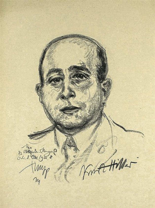 Kurt Hiller, gezeichnet von Emil Stumpp, 1924